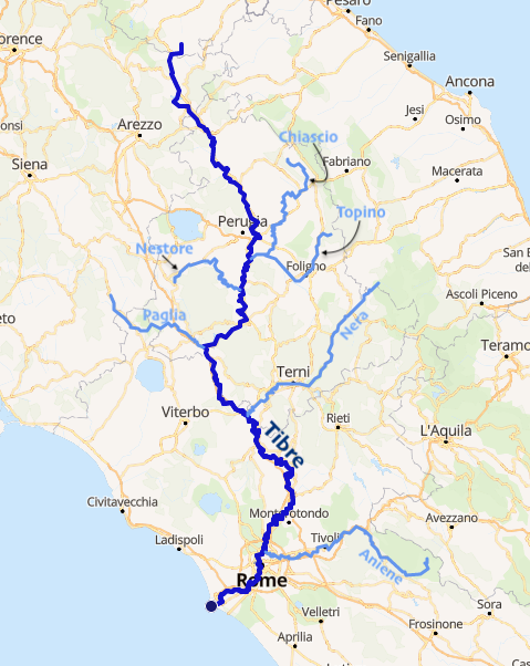 carte réalisée sur umap This map may be incomplete, and may contain errors. Don't rely solely on it for navigation.